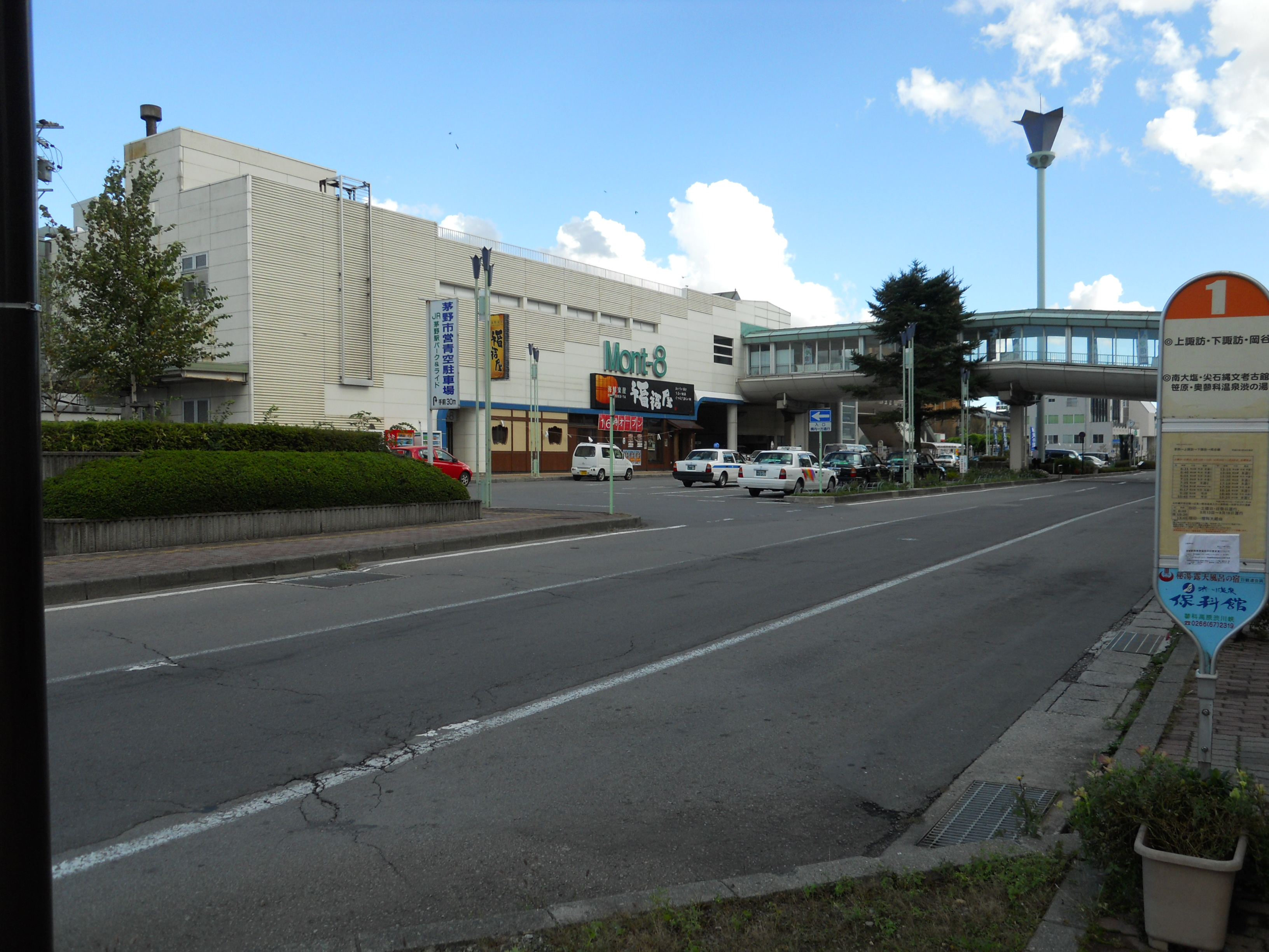 JR中央線茅野駅